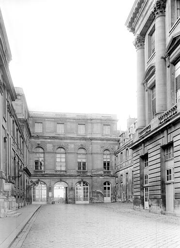 Bâtiment Louis XIII dans la cour des Princes : Vue d'ensemble